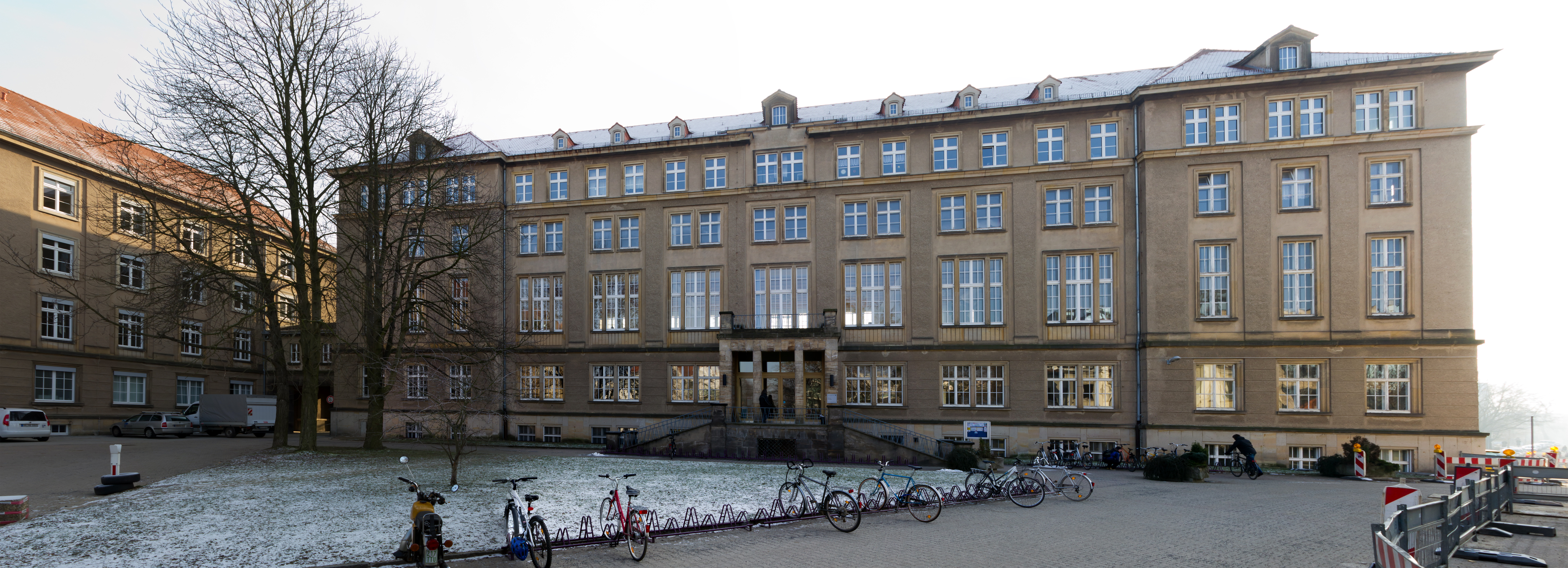 Mensa und Studentenwohnheim des Studentenwerkes Dresden am Uniklinikum